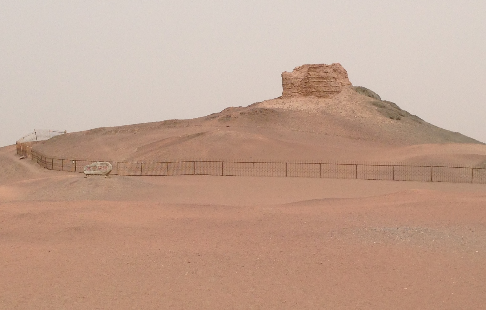 Ruinerna av tornet vid Yangguan